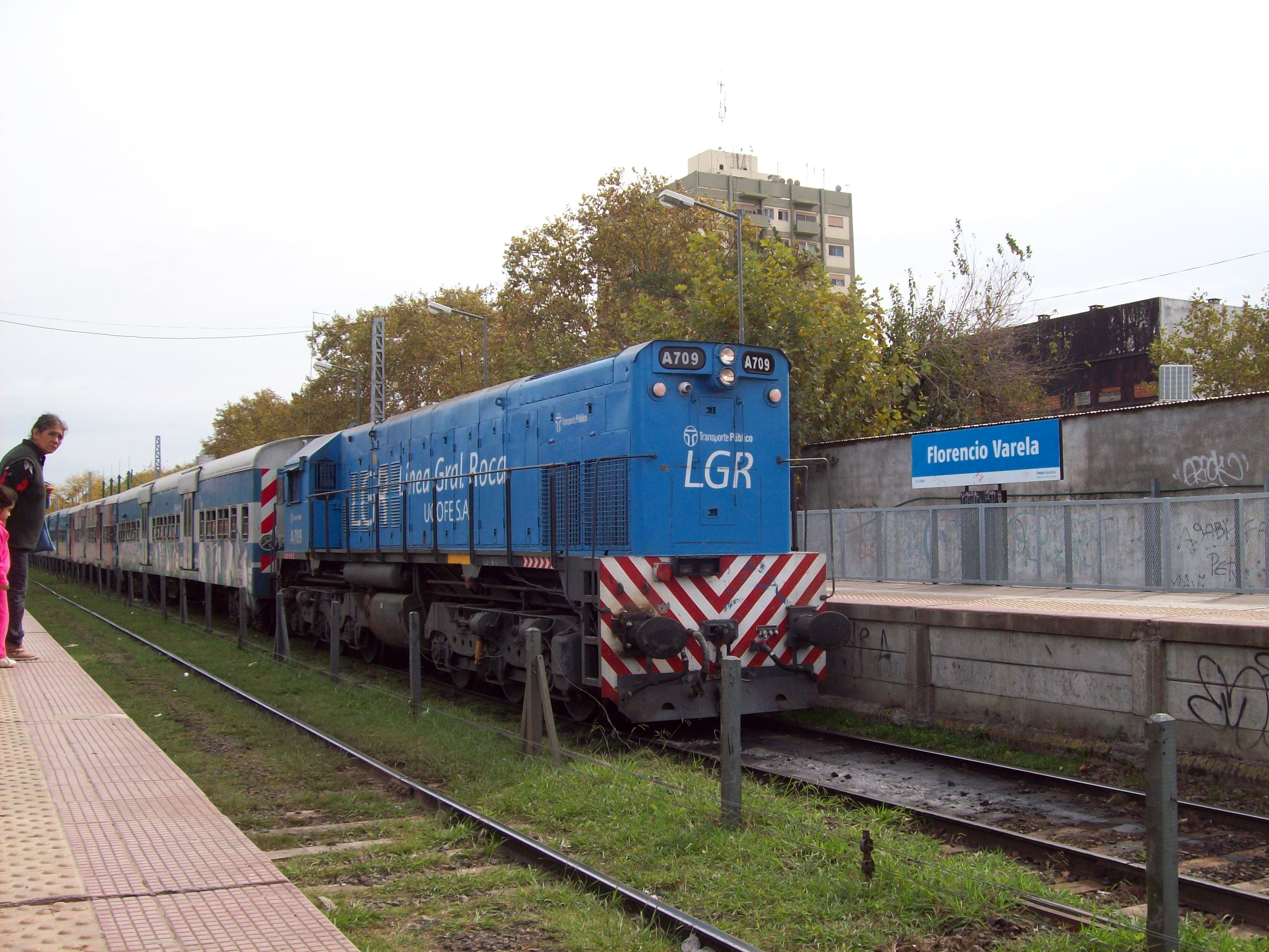 Cercanías de la estación Florencio Varela del ferrocarril durante 2015, fotos antes de los comienzos de las obras de electrificación.